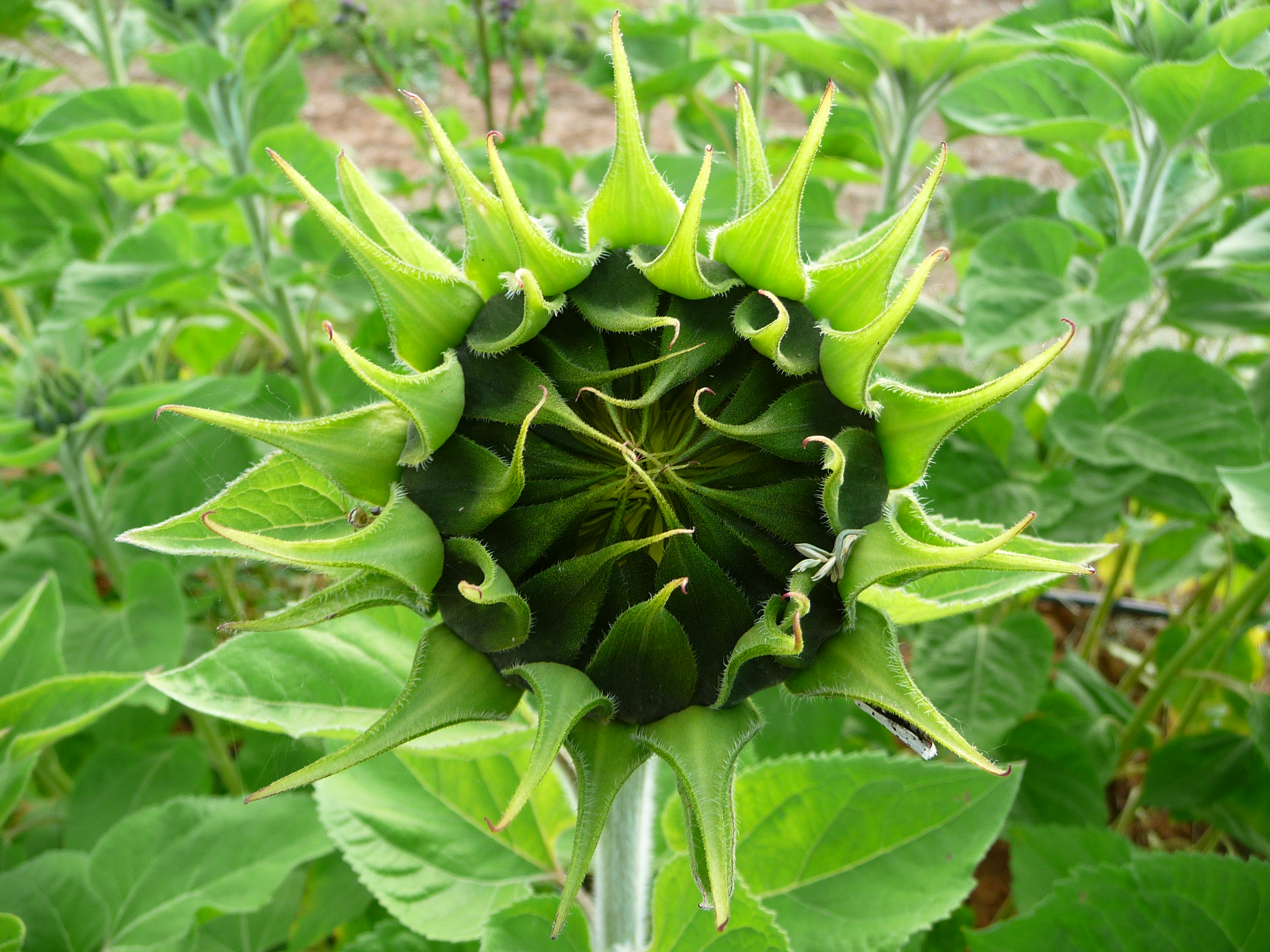 Geschlossene Blütenknospe einer Sonnenblume (Helianthus annuus)